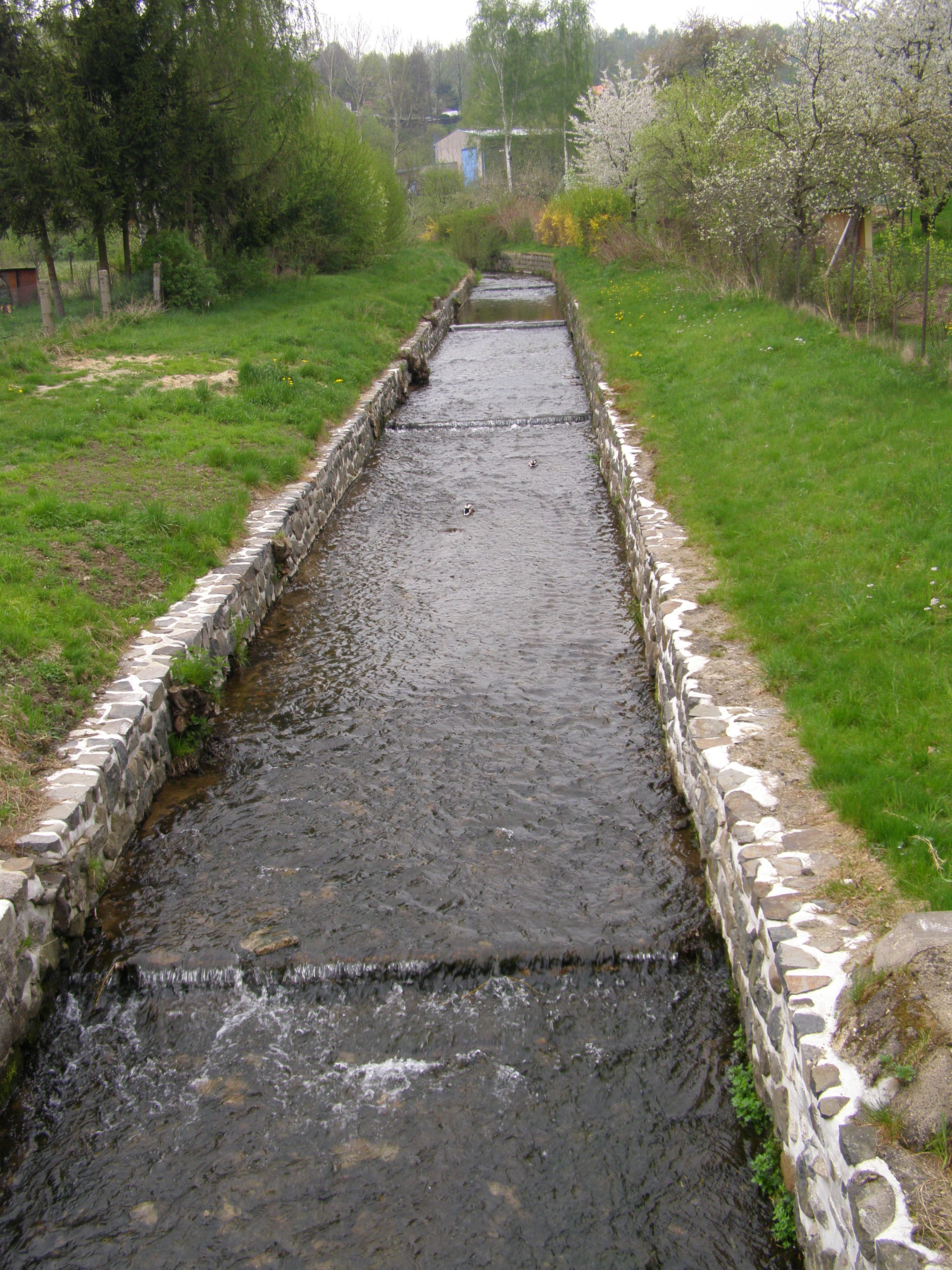 Frýdlant, potok Řasnice